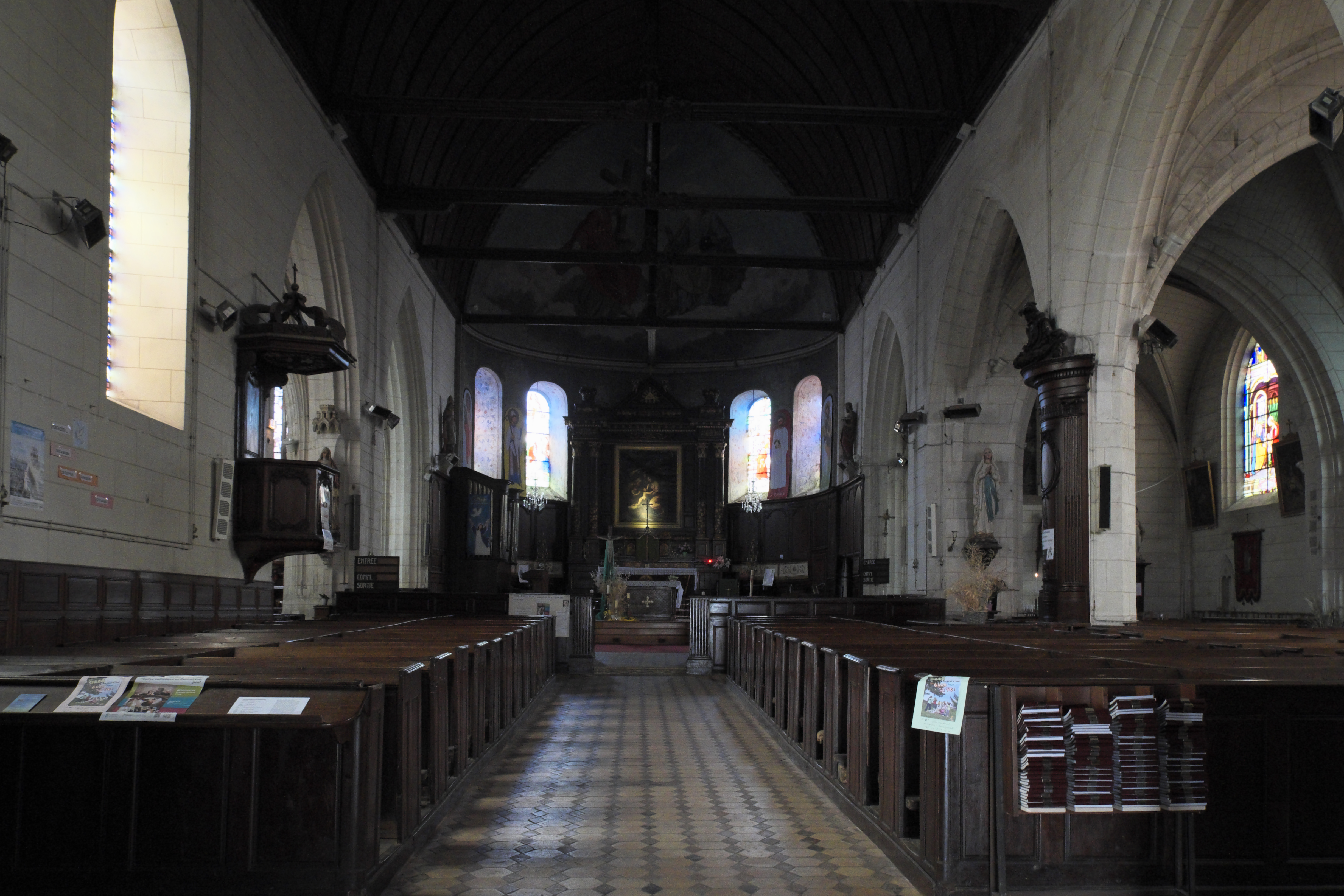 Katholische Kirche Saint-Lubin in Brou im Département Eure-et-Loir (Centre-Val de Loire/Frankreich), Innenraum